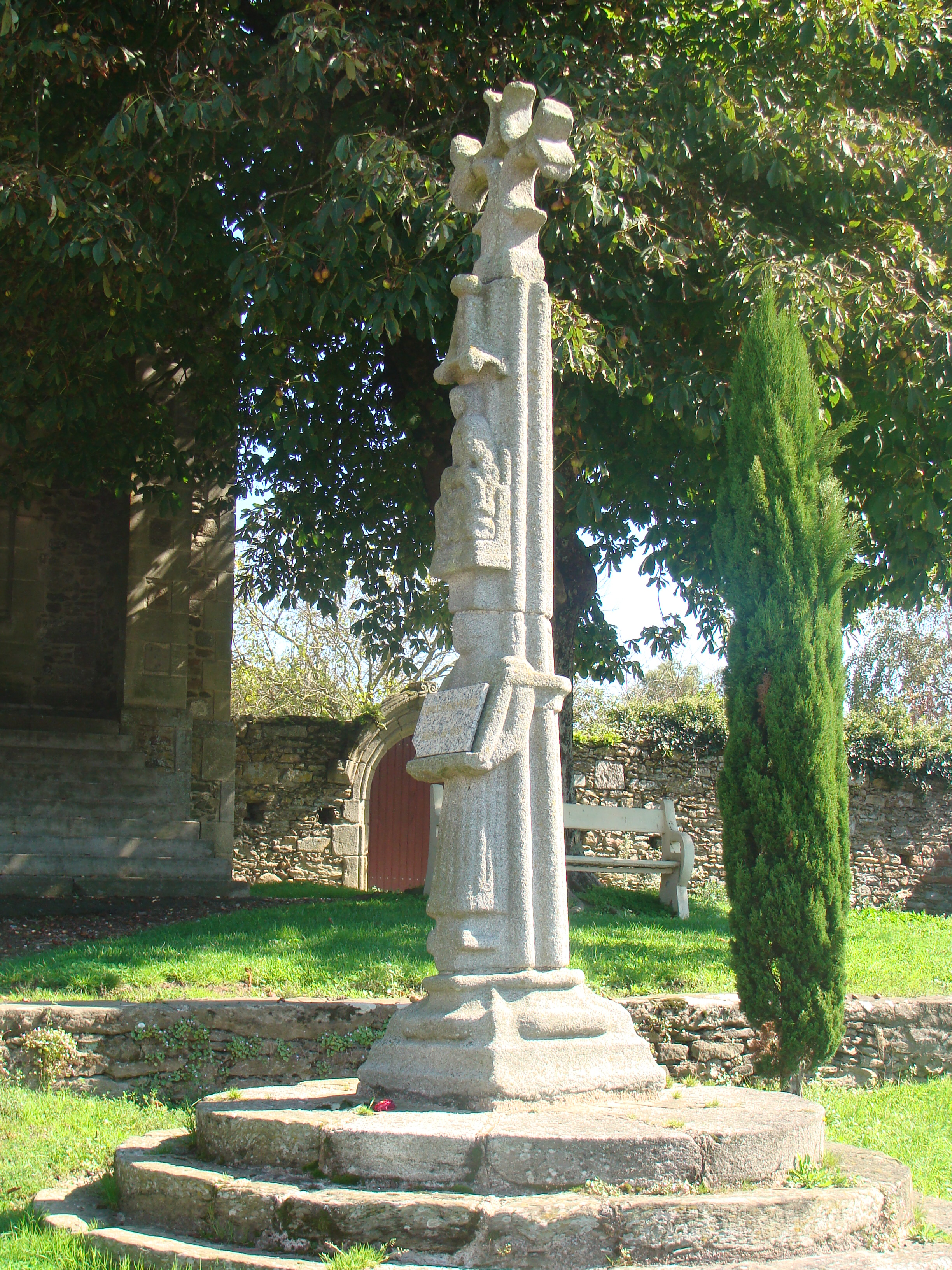 Croix du XIVe siècle, 400 cm de haut , sur laquelle est sculptée une croix de malte et une vierge de Piété